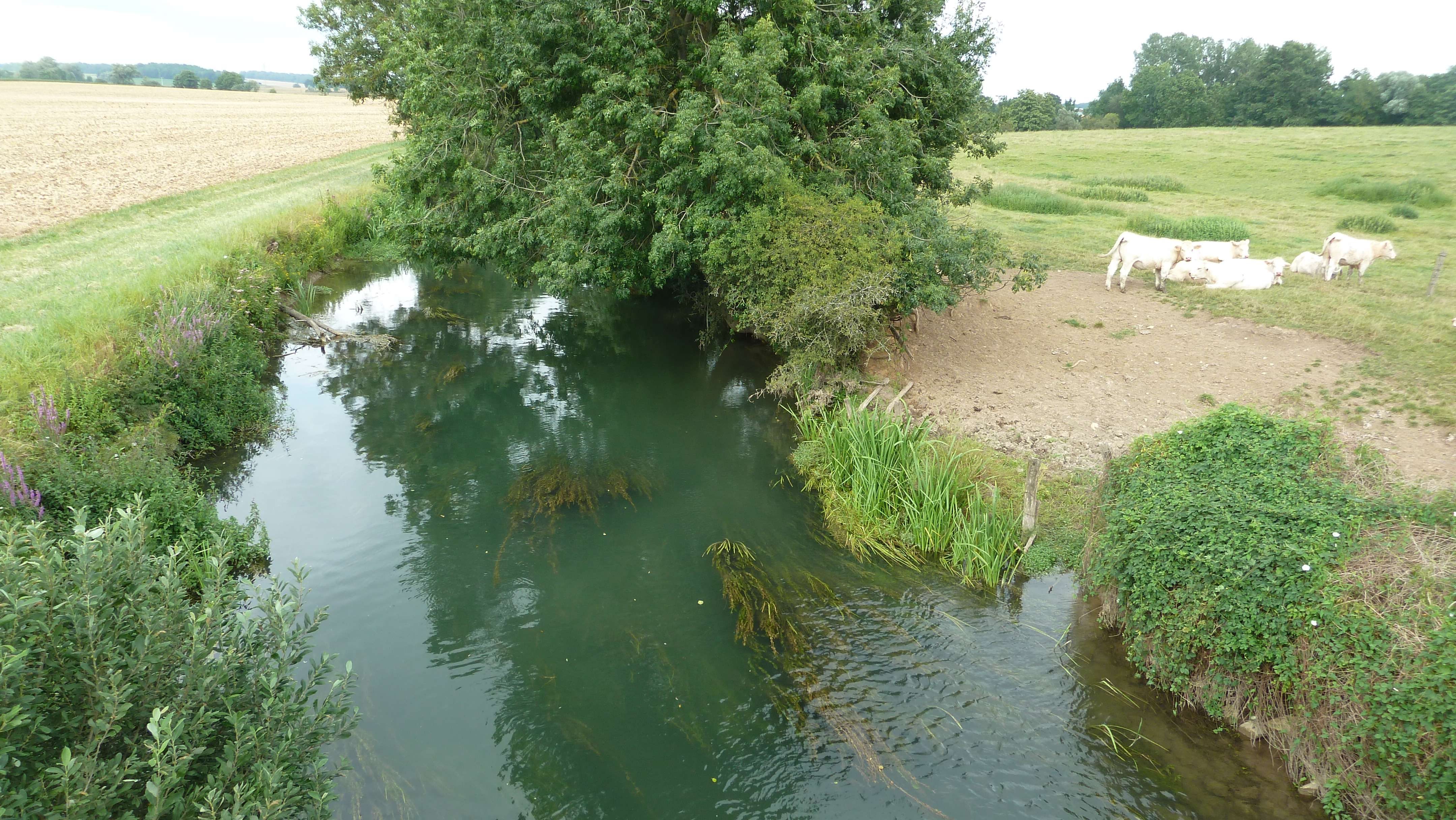 La Bèze à Triey aux environs de la déchetterie de Drambon (pont sur la D104).